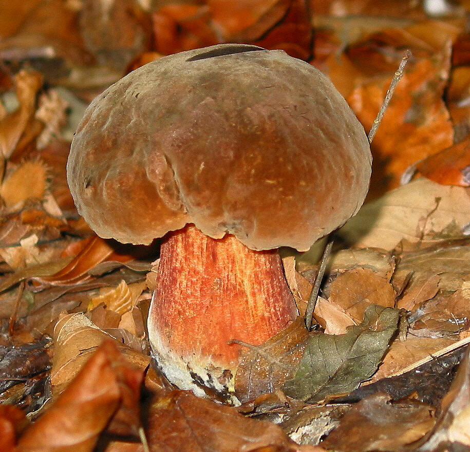 Boletus erythropus